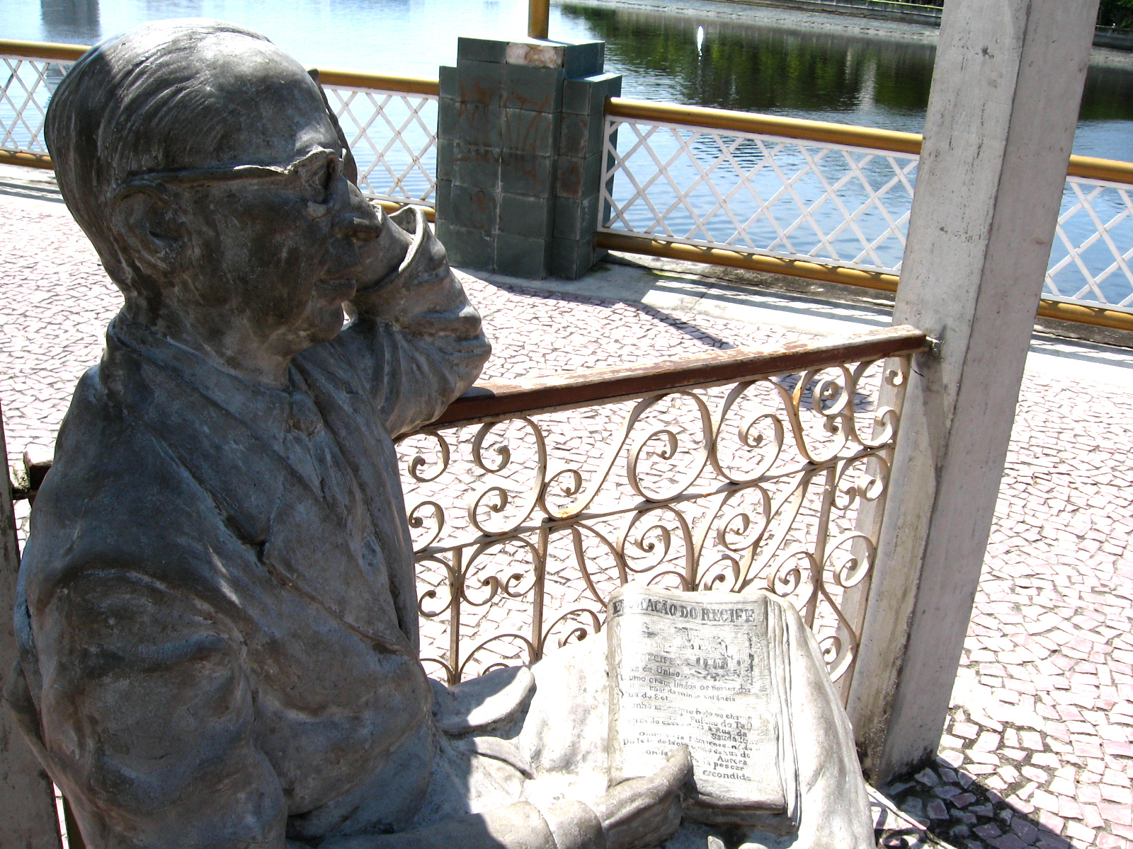 Circuito da Poesia - Recife - Pernambuco - Brasil - No circuito da poesia de hoje, Manuel Bandeira, a estátua número 1 do circuito, às margens do Capibaribe, em Recife. Wikipedia - In english